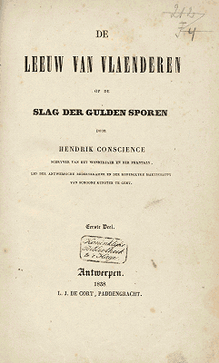 1st page De leeuw van Vlaenderen by Hendrik Conscience